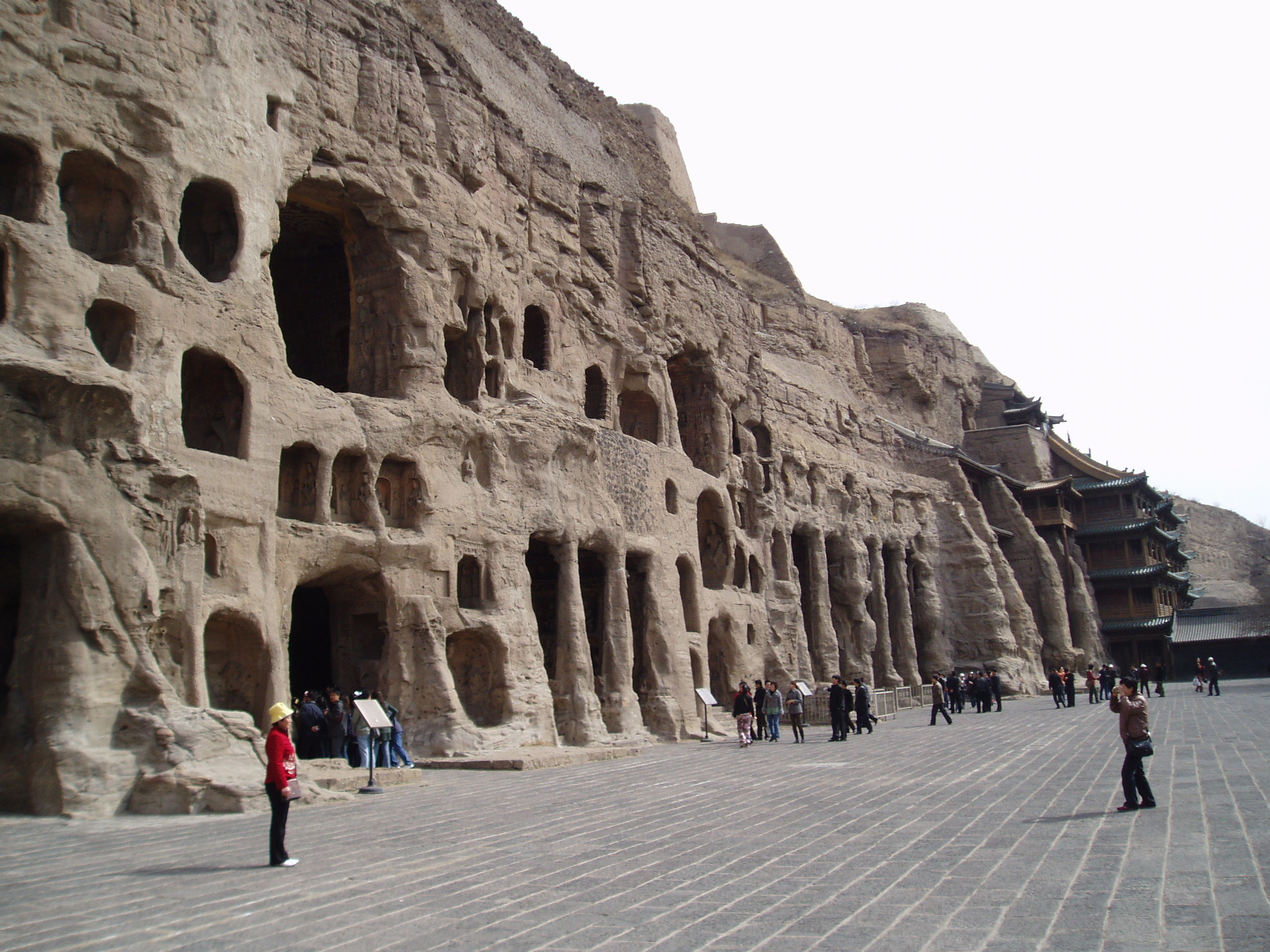 Yungang Grottoes, Datong, Shanxi, China